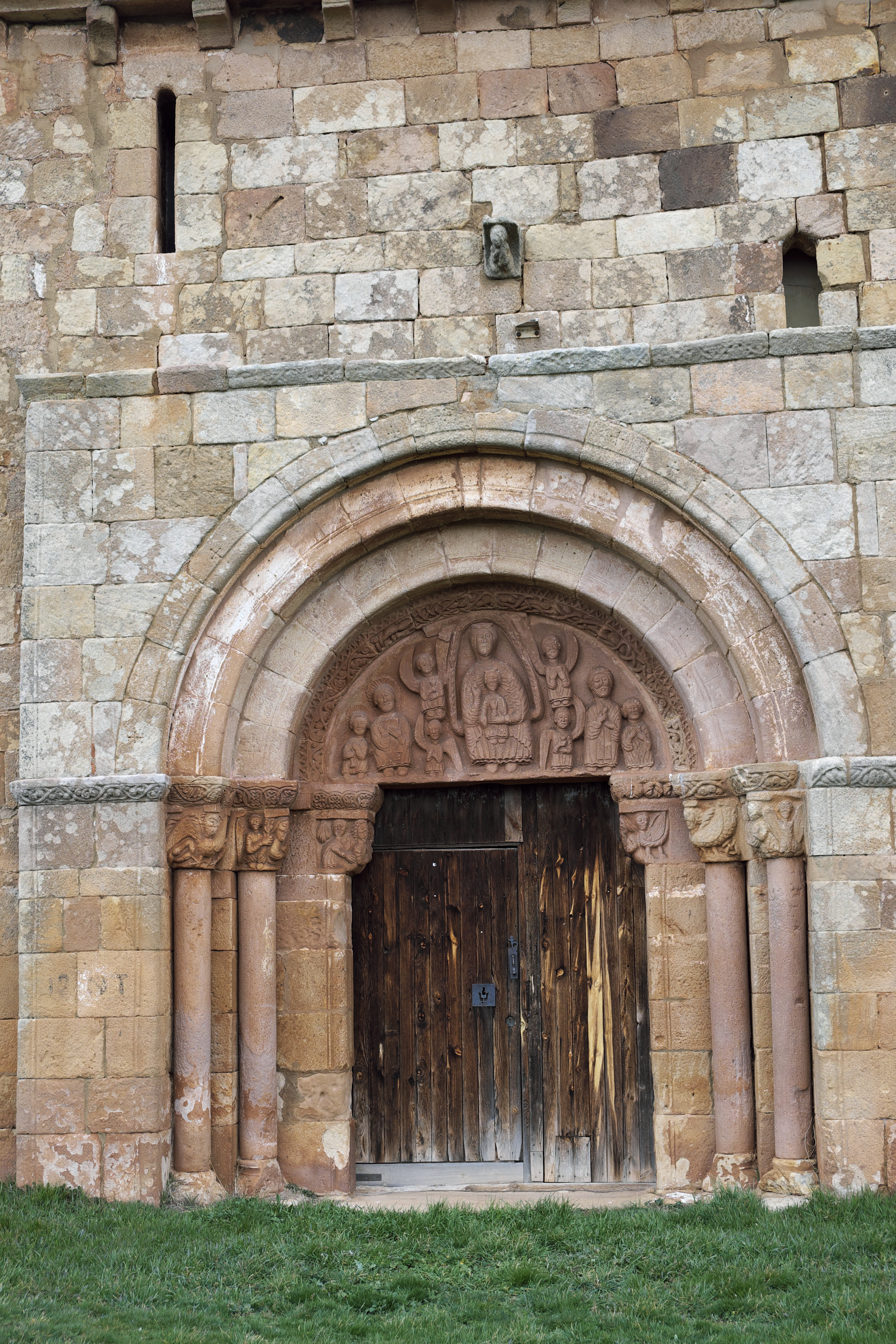 Kirche San Juan Bautista (Johannes der Täufer) in Tozalmoro in der Provinz Soria (Kastilien-León/Spanien), Südportal